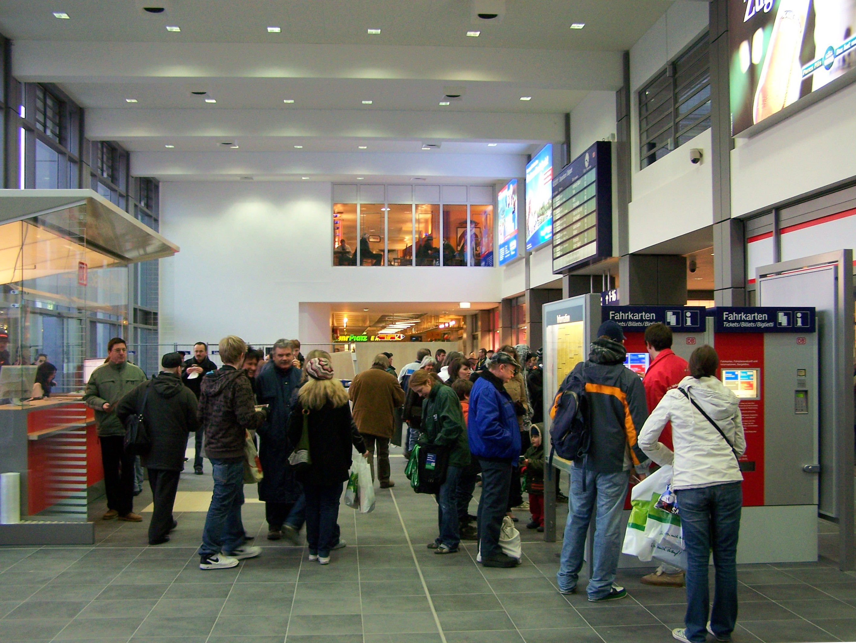 Eingangshalle am Eingang City des Saarbrücker Hauptbahnhofs (Eurobahnhof Saarbrücken)